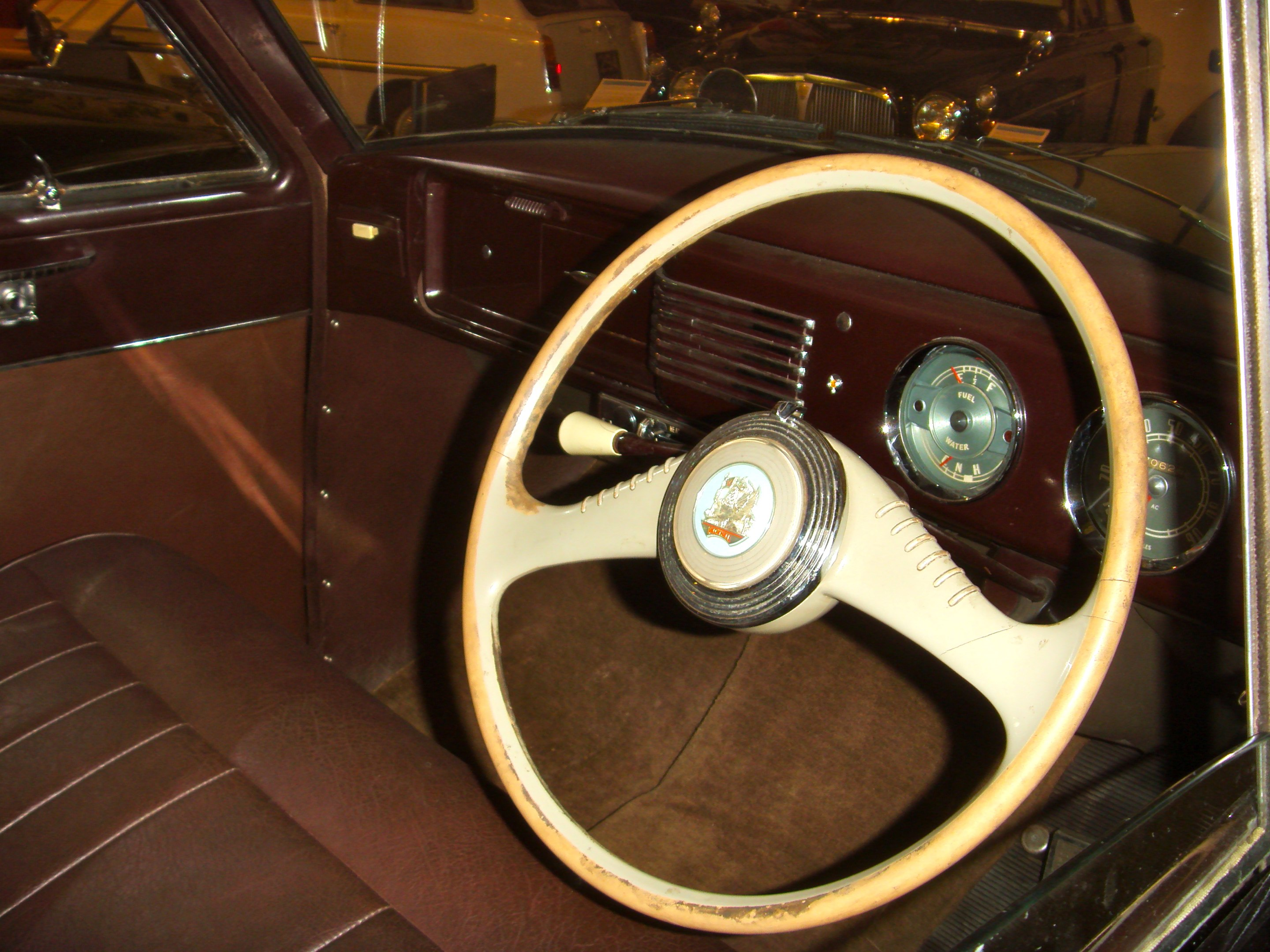 1953 Vauxhall Wyvern